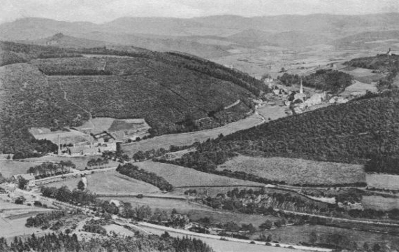 Blick auf Kirchhundem mit dem Heitmicker Hammer (links im Bild) um 1900 vom Krähenberg aus.